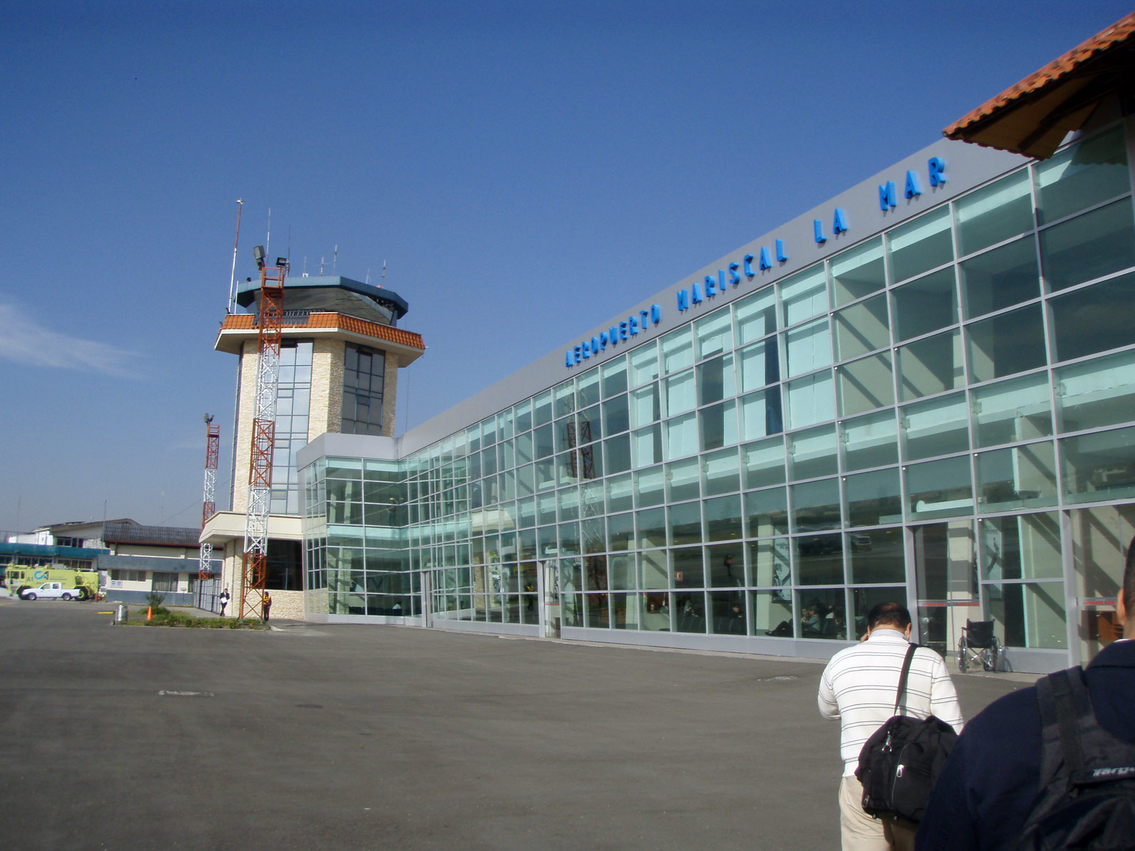 Aeropuerto Mariscal La Mar, Cuenca, Ecuador.